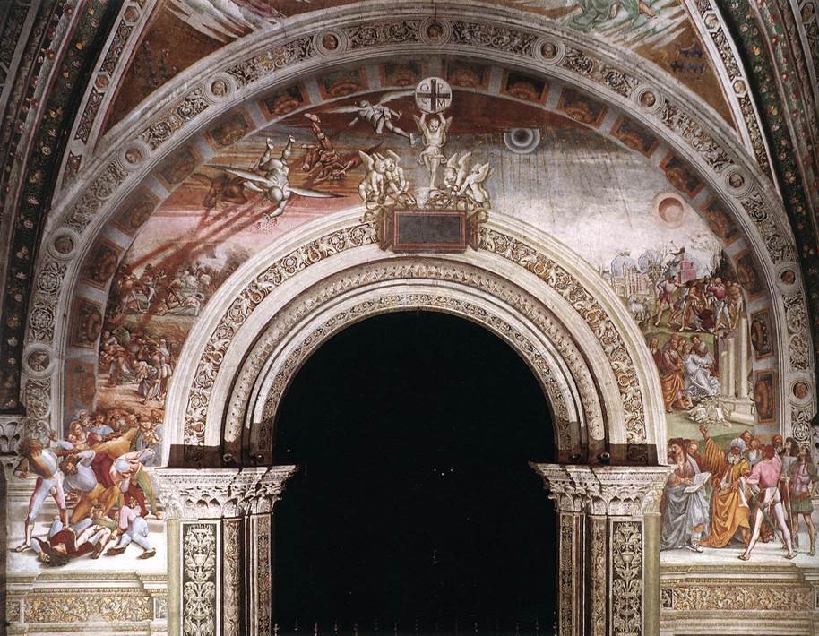 SIGNORELLI, Luca Apocalypse Fresco Chapel of San Brizio, Duomo, Orvieto